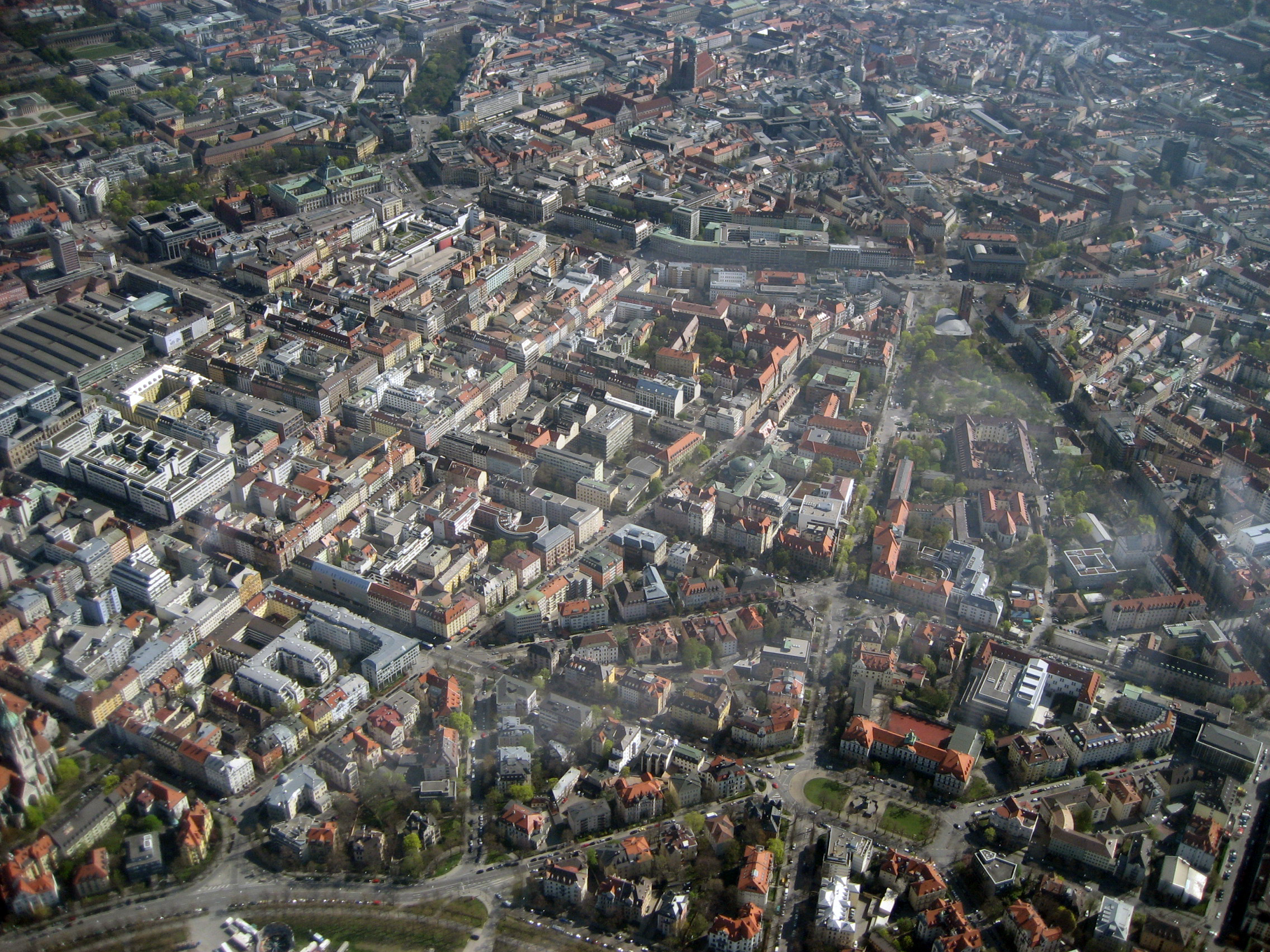 Luftbild der Münchner Ludwigsvorstadt mit der Altstadt im Hintergrund